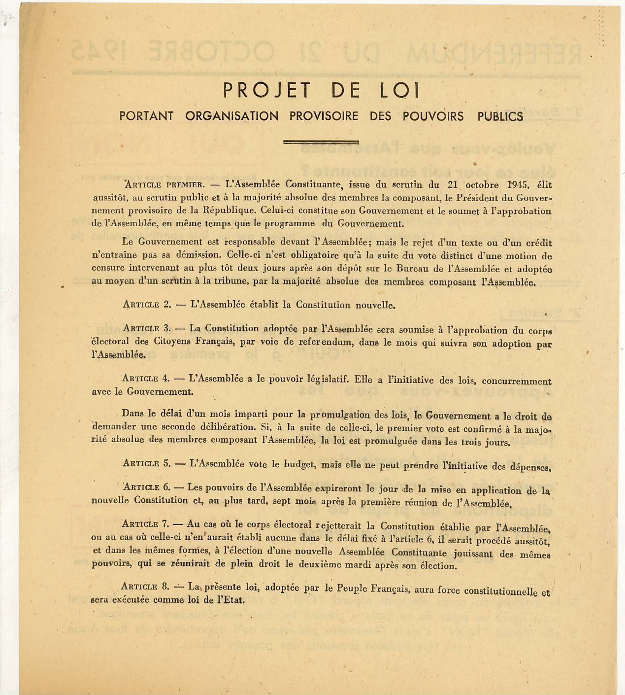 Programme du référendum du 21 octobre 1945 sur la loi constitutionnelle de 1945 - verso.